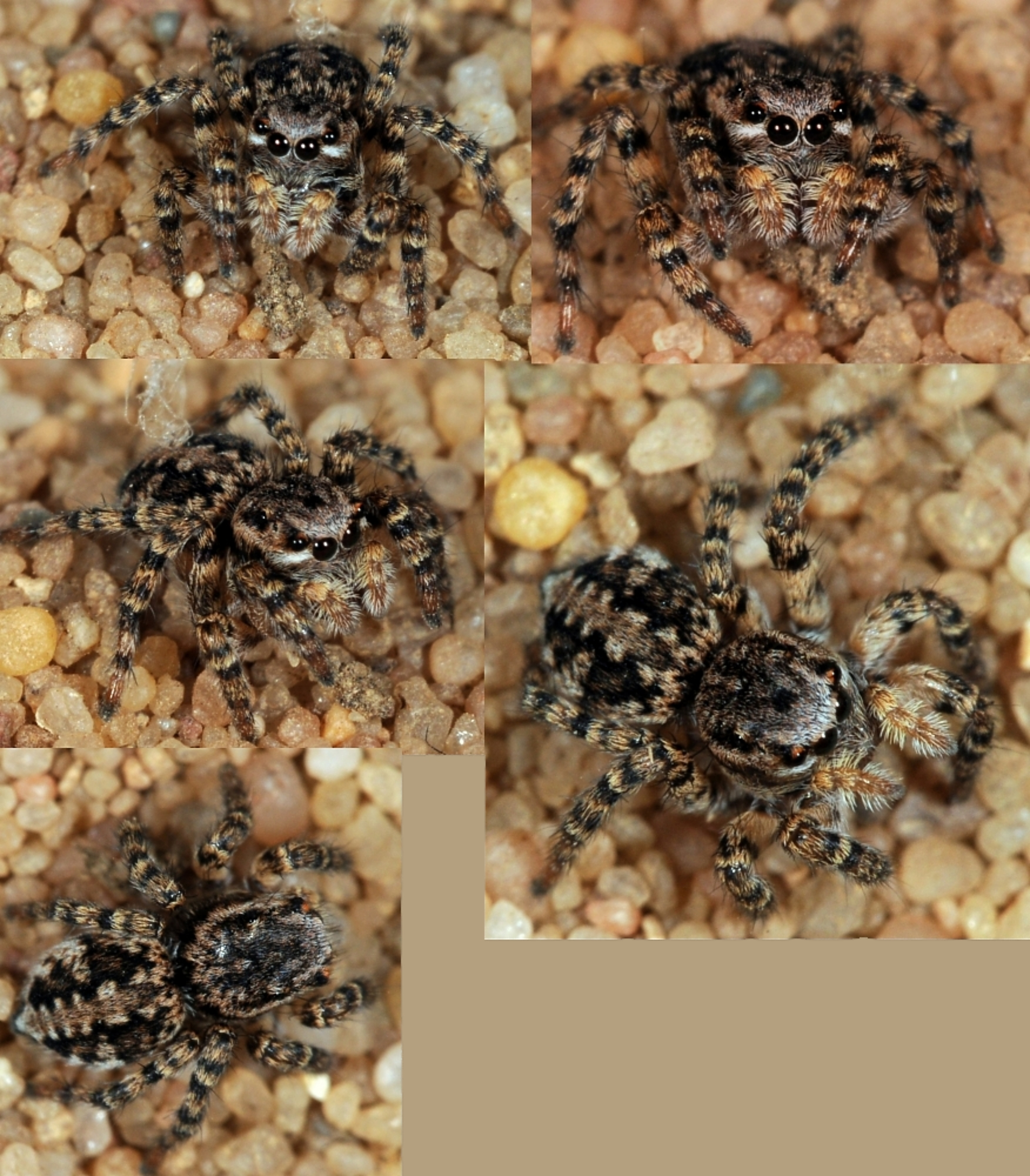 Aelurillus vinsignitus, Weibchen, Stromtrasse bei Kelsterbach - neben Startbahn West, Hessen, Deutschland